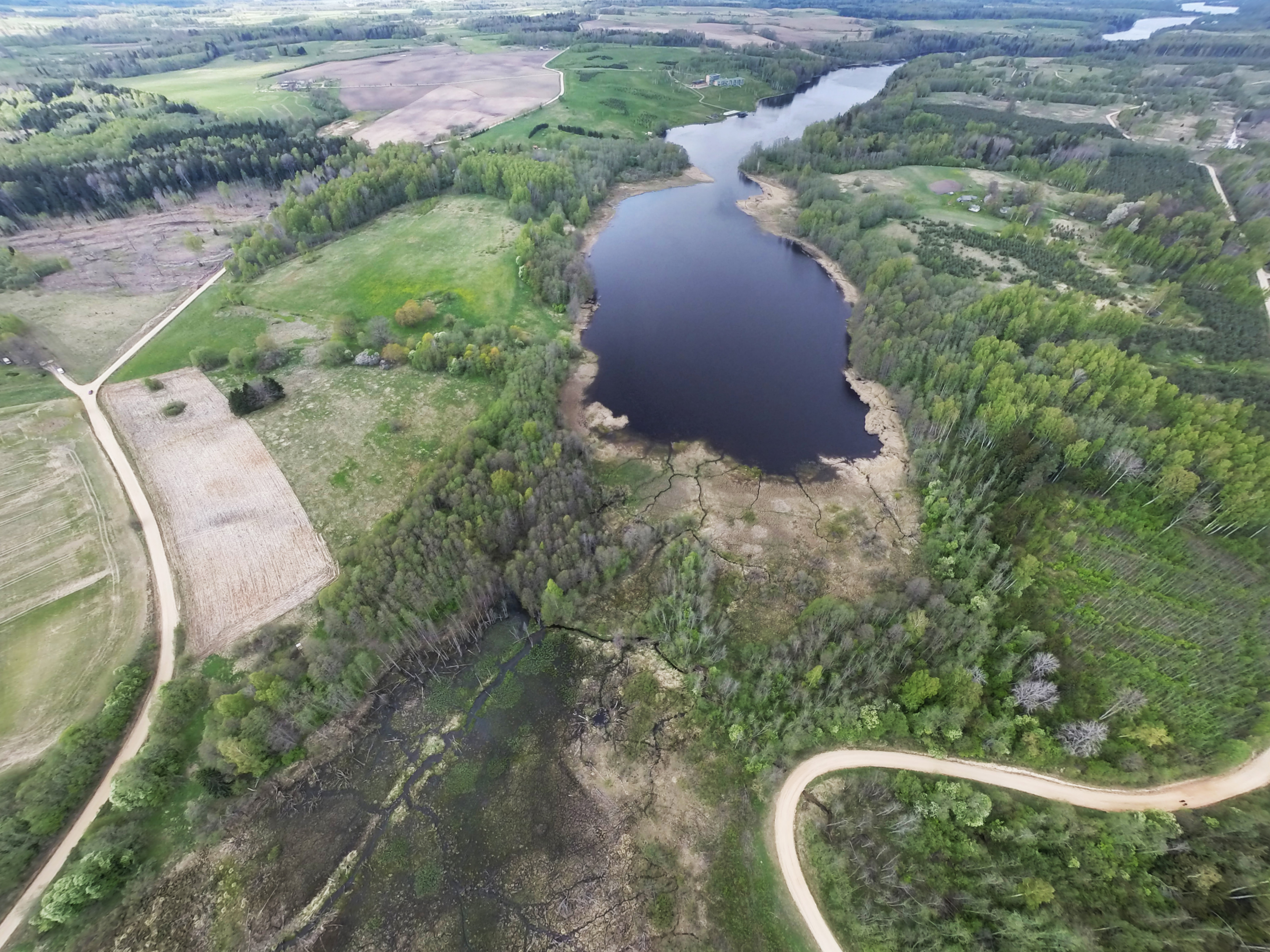 Cieceres ezers-birds eye view